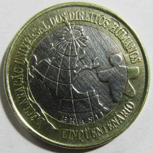 Moeda de 1 real 1998 – Declaração dos Direitos Humanos